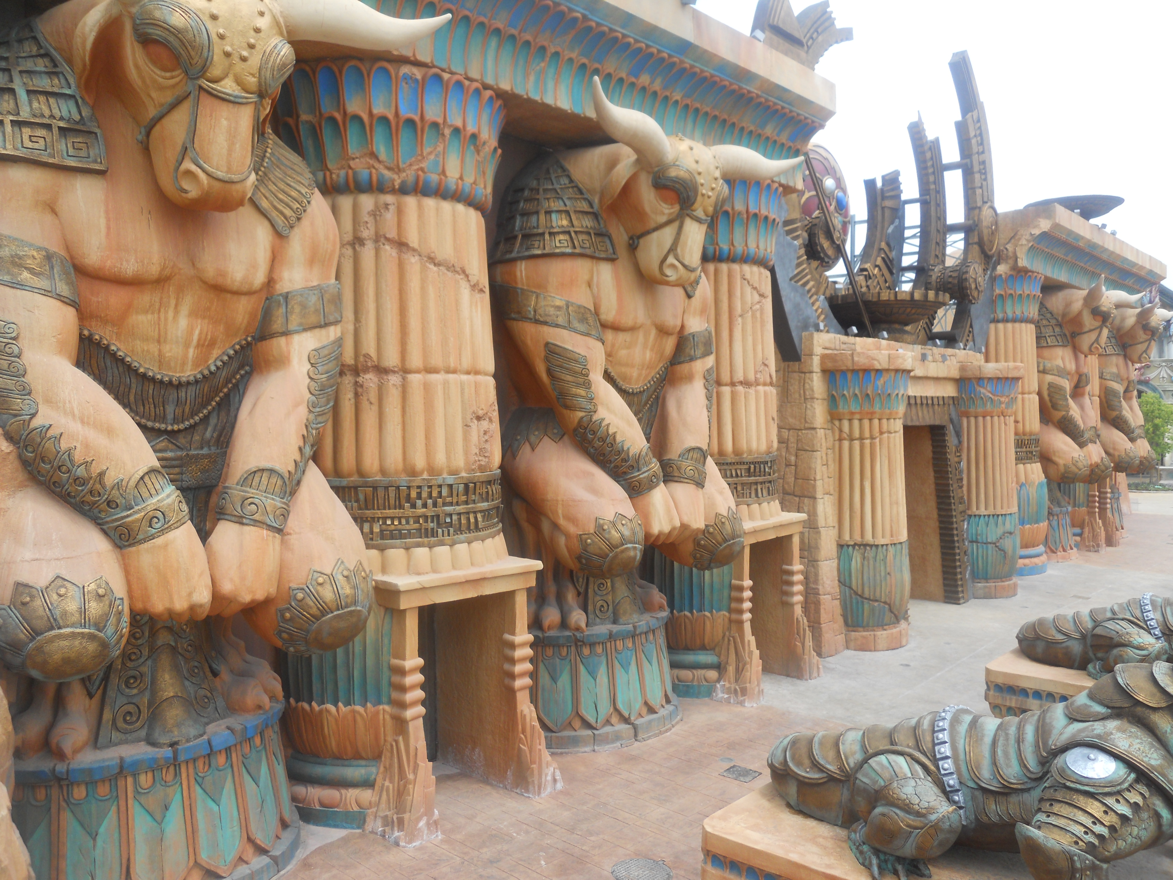 La dark ride interattiva del parco!